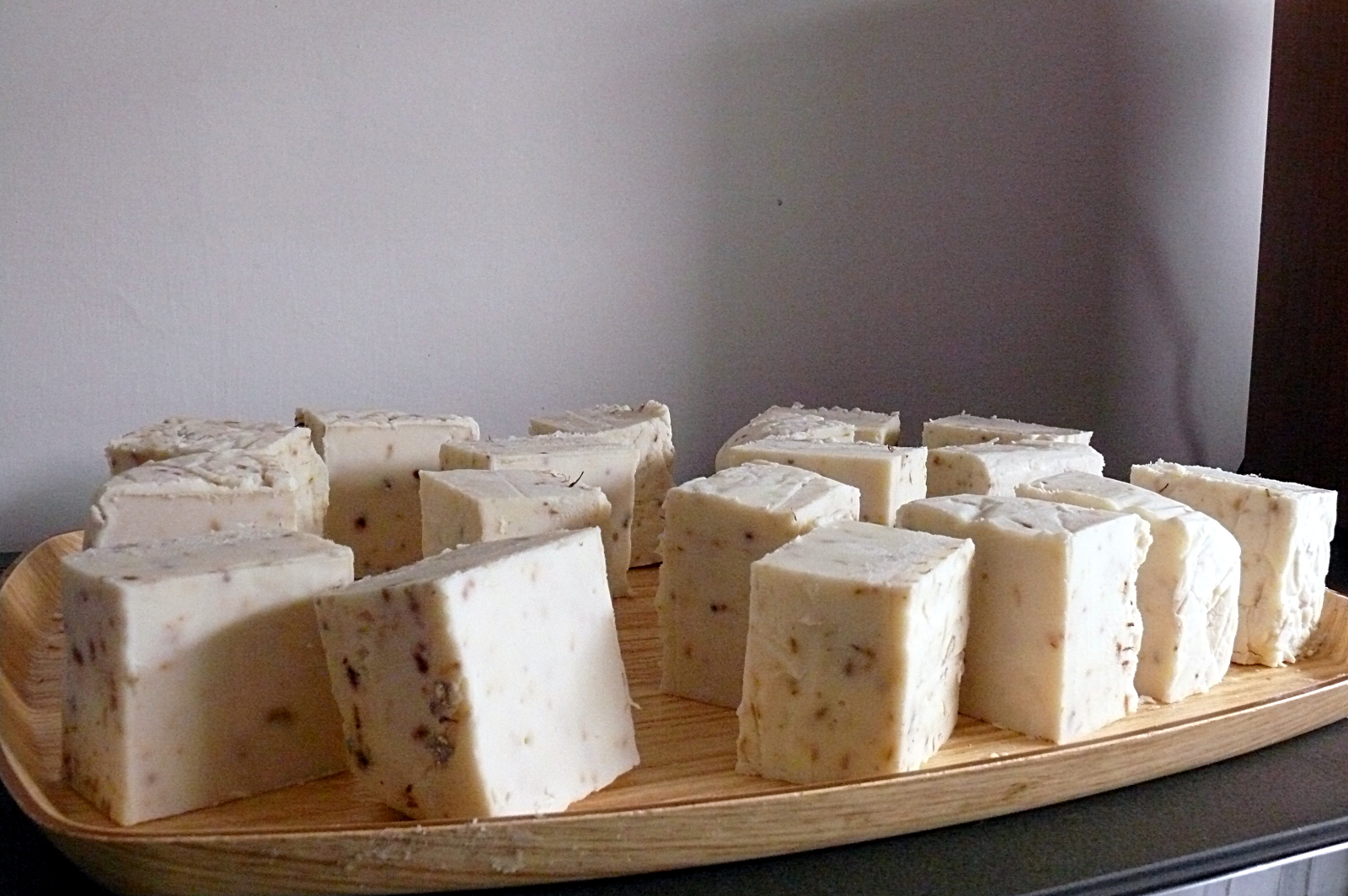 Sapone artigianale tagliato in panette